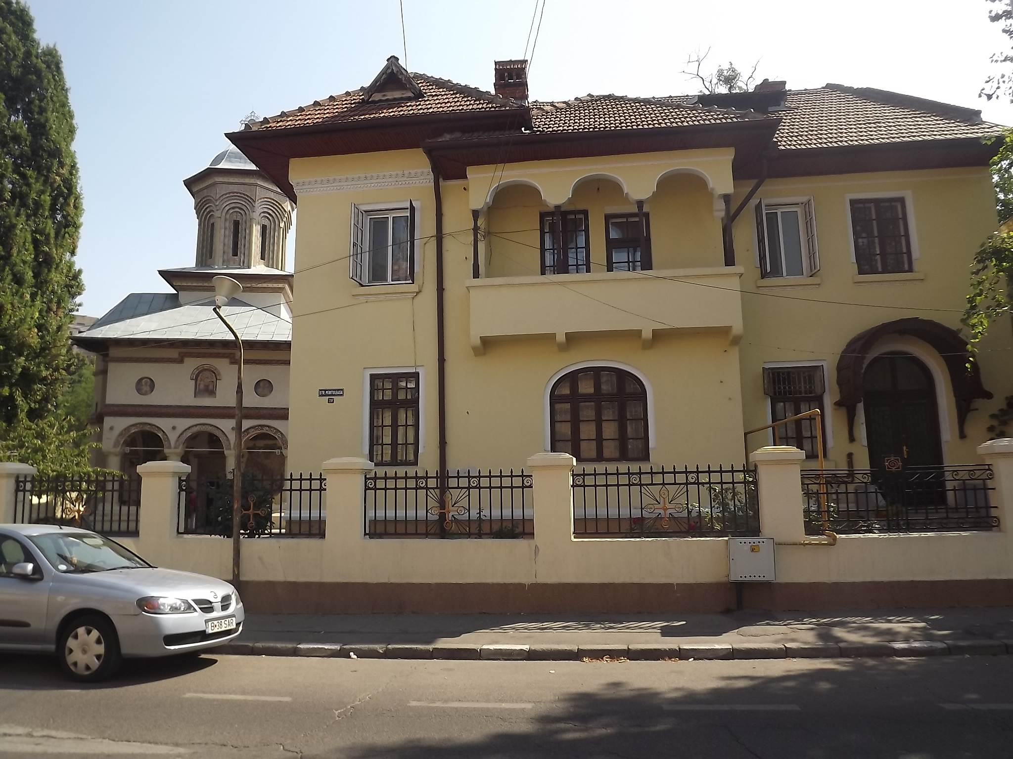 Casă parohială 02